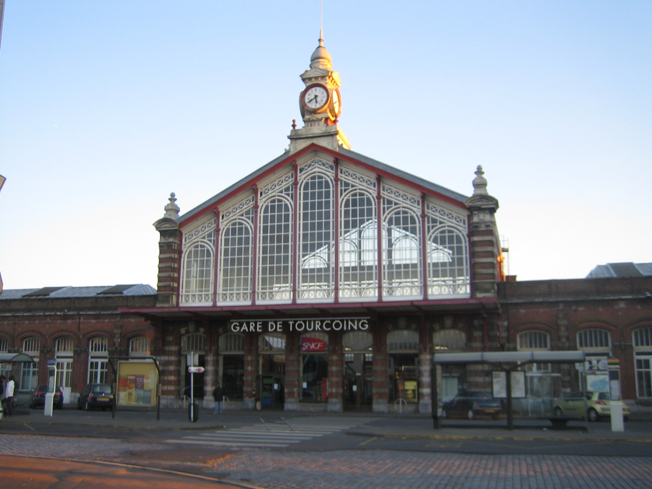 Gare de Tourcoing